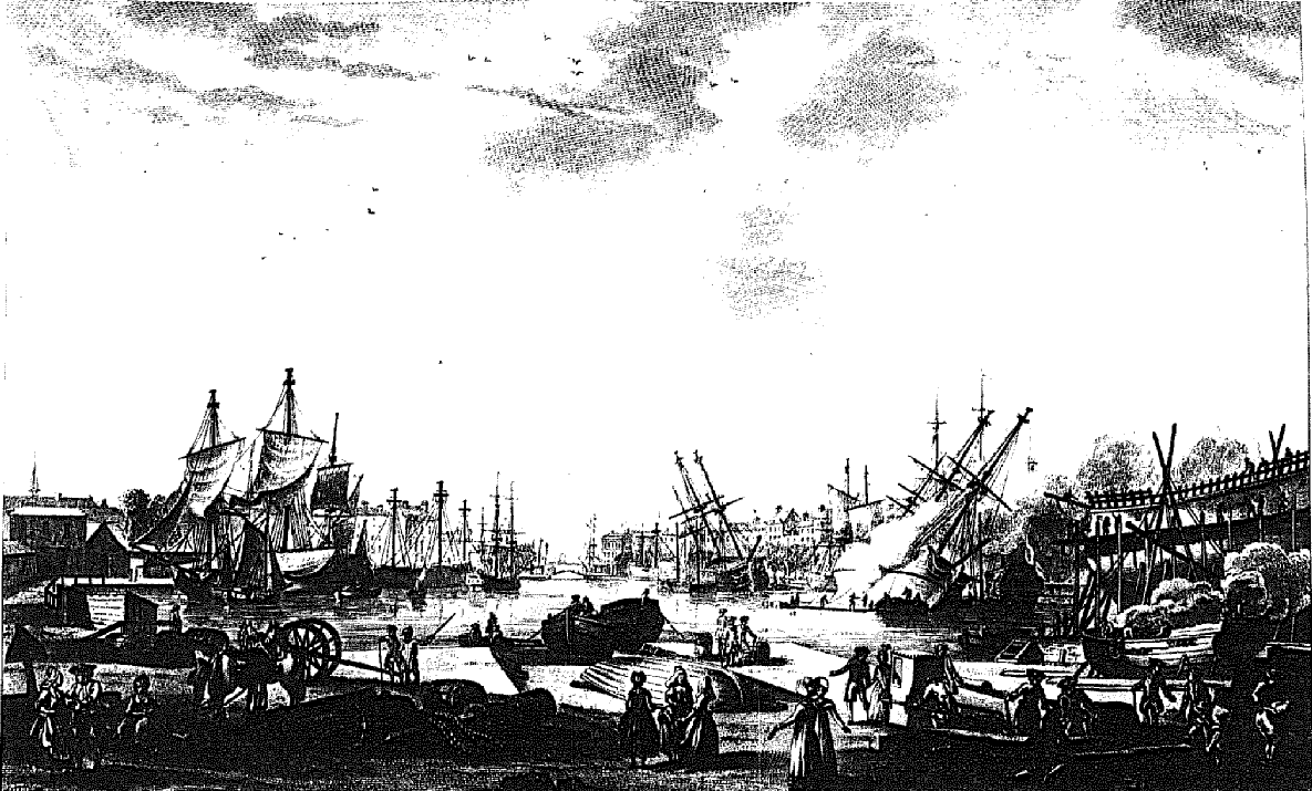 Port du Havre.